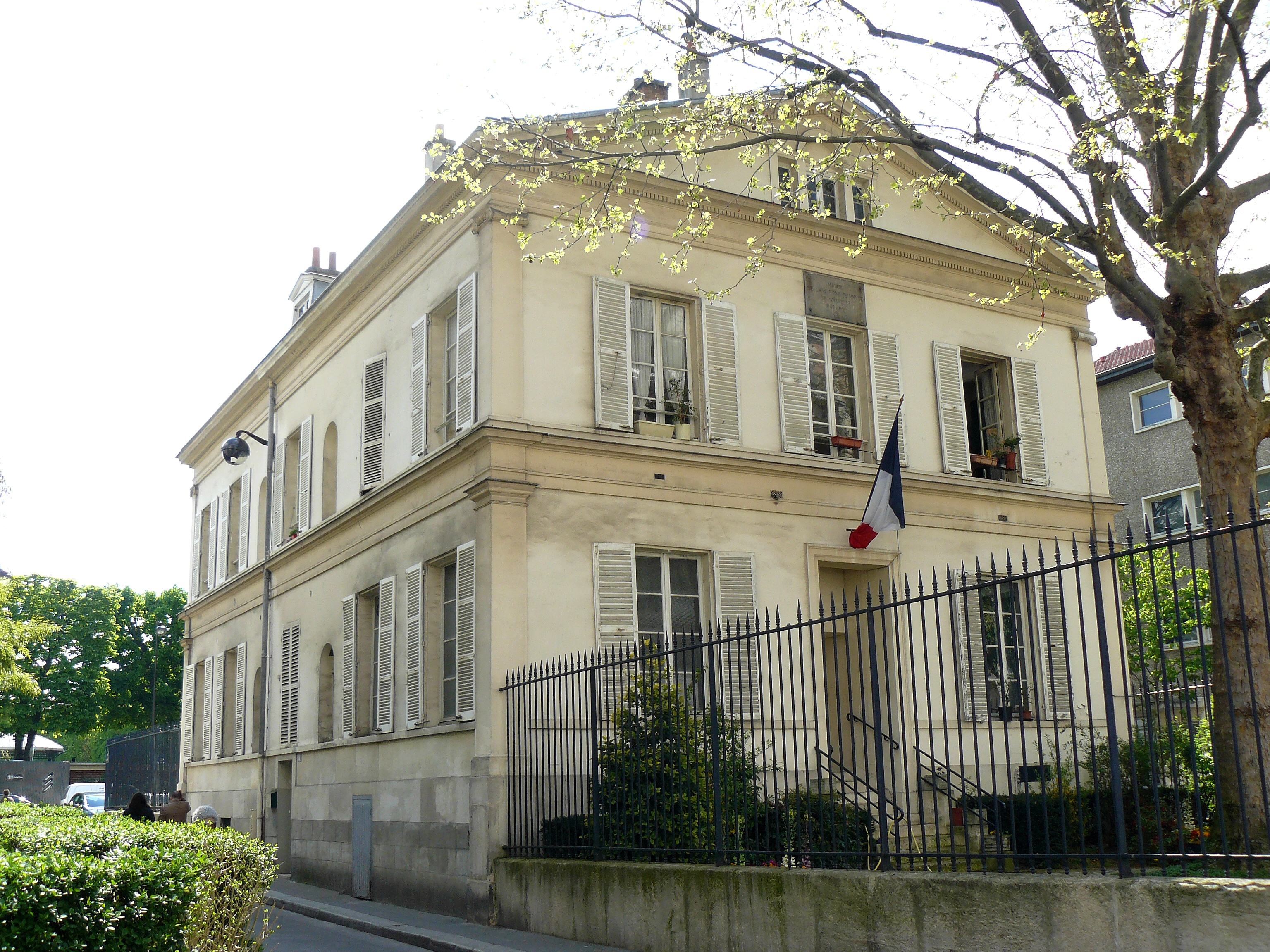 L'ancienne mairie (1840-1860) de la Commune libre de Grenelle, place du Commerce à Paris (15e Arrd.).